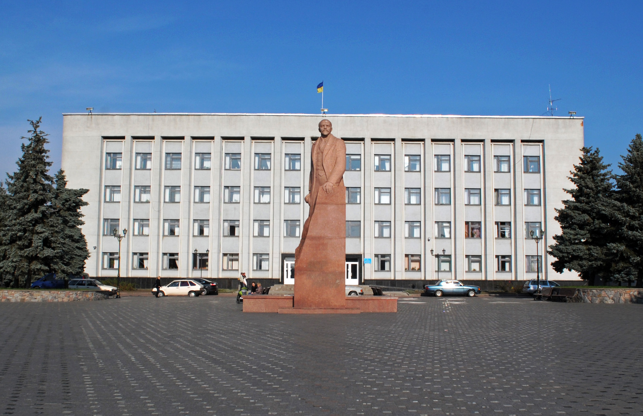 Пам'ятник Леніну В. І., Бердичів, Площа Жовтнева. Зруйнований в 2014 році.